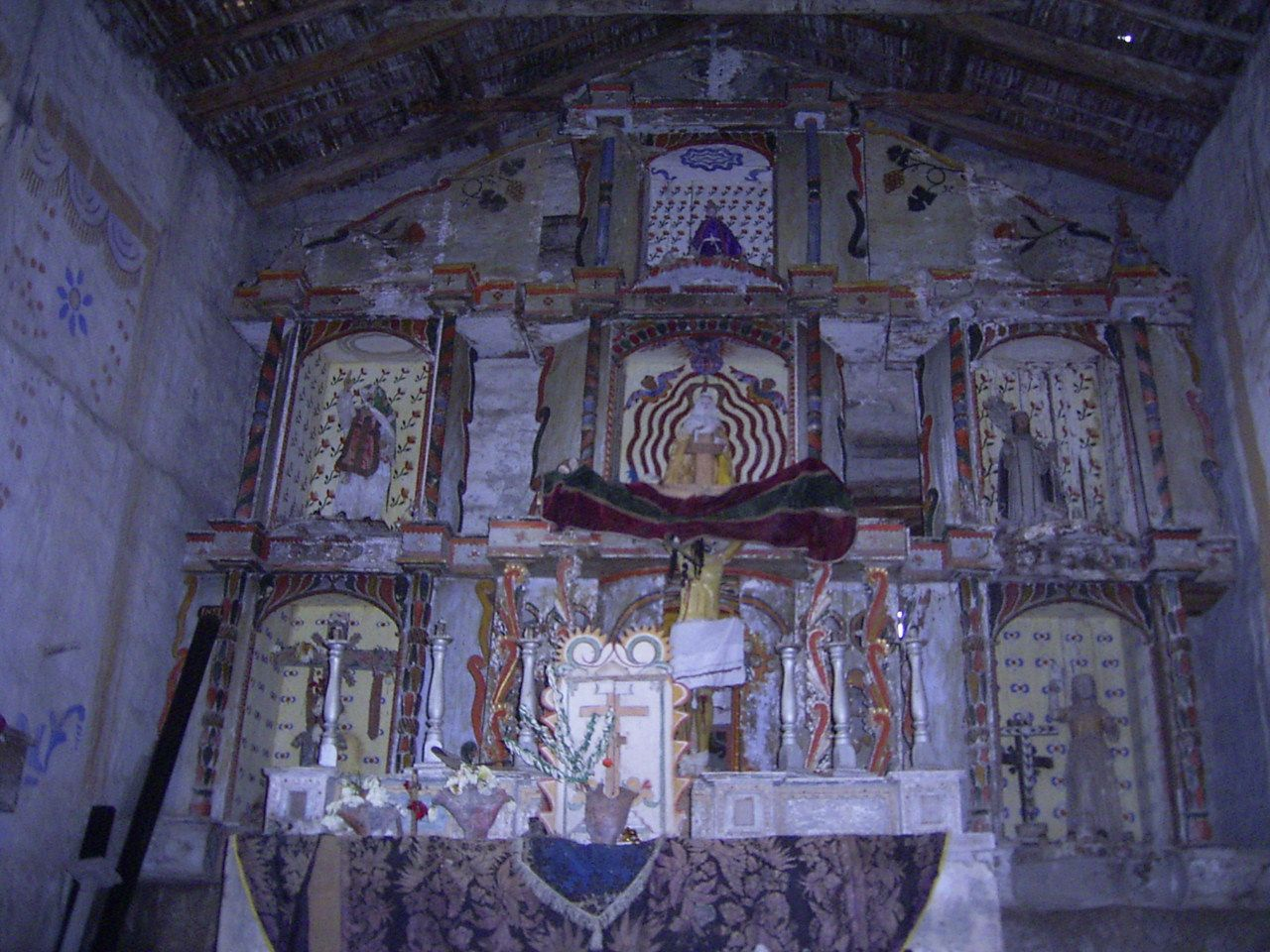 el retablo de la iglesia del pueblo Chiliquin, Provincia de Chachapoyas, Amazonas, Peru.